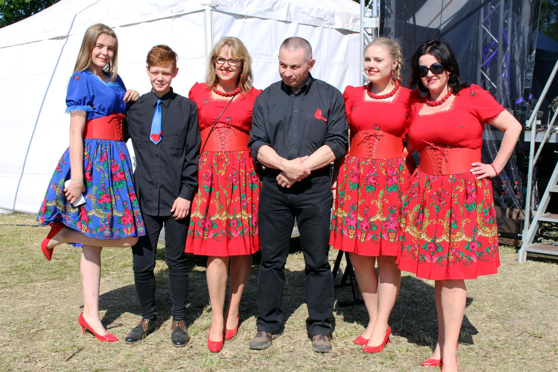 Zespół 'Kosy'